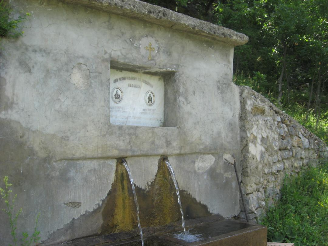 Чешма Гумнишча - Горно Мелничани, изградена 1938 год.